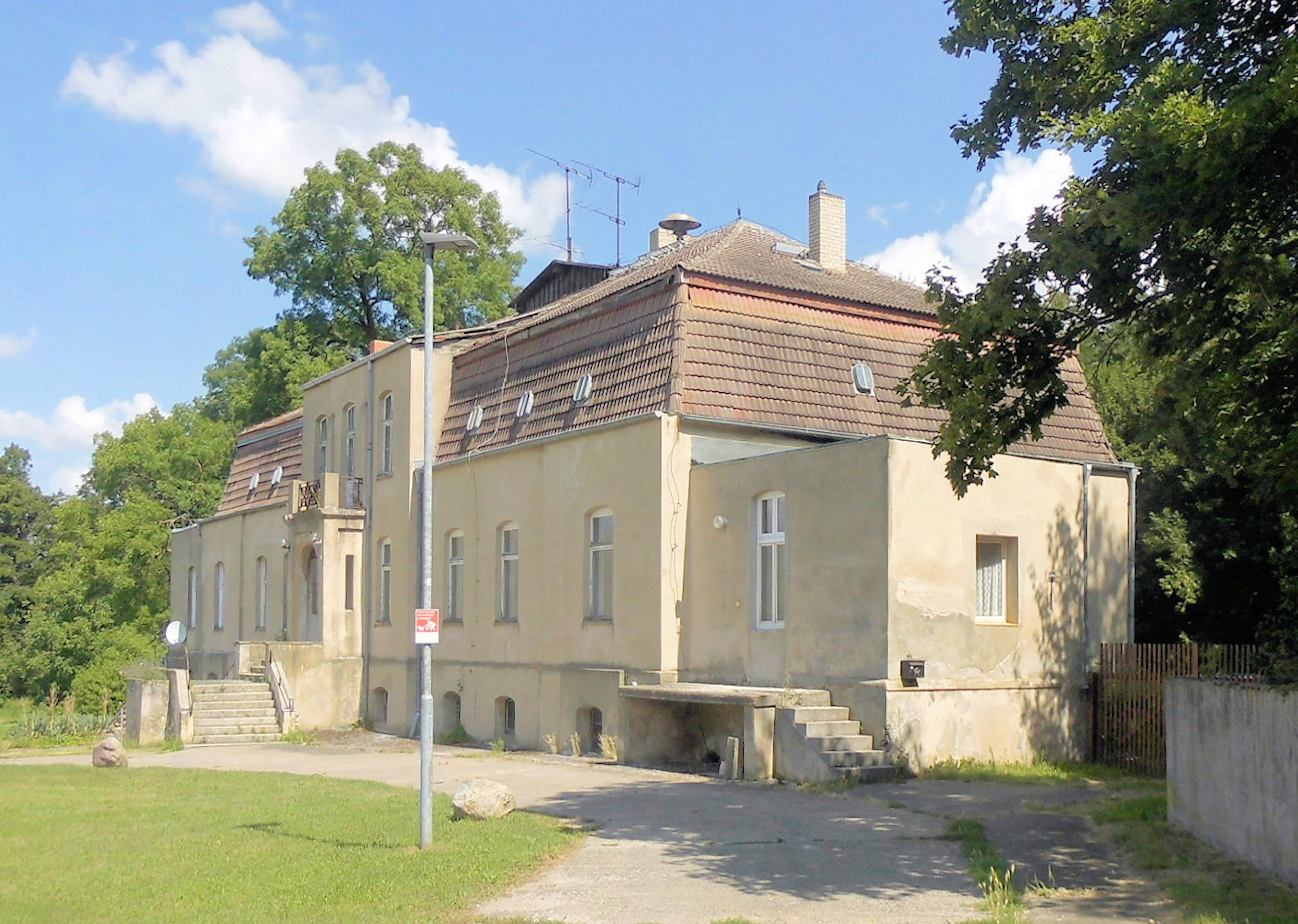 Gutshaus in Grünow, Gemeinde Mark Landin